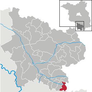 Großthiemig in Brandenburg (Country) - District Elbe-Elster